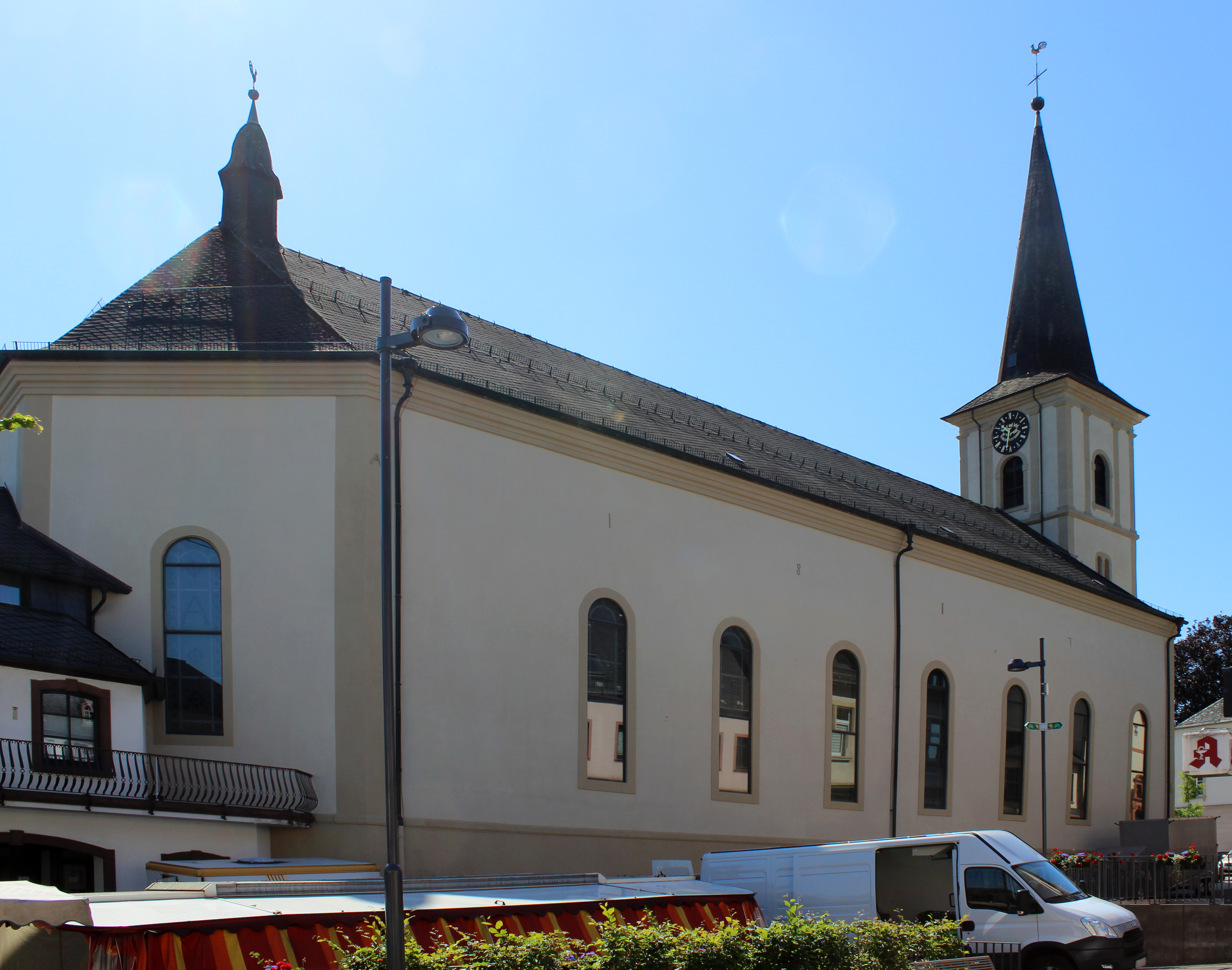 Katholische Allerheiligenkirche in Wadern, Saarland